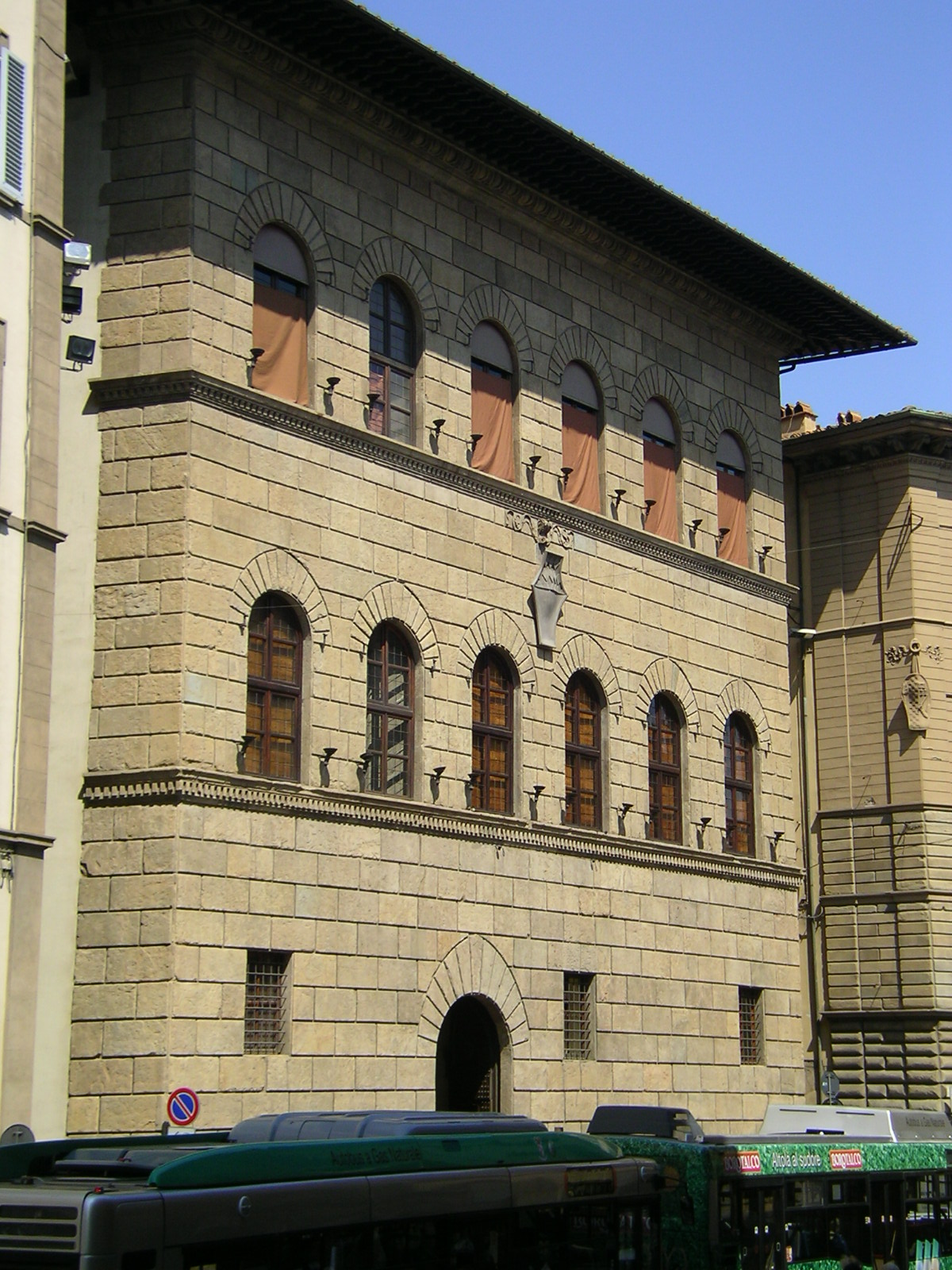 Palazzo Antinori (front) in Florence, Italy